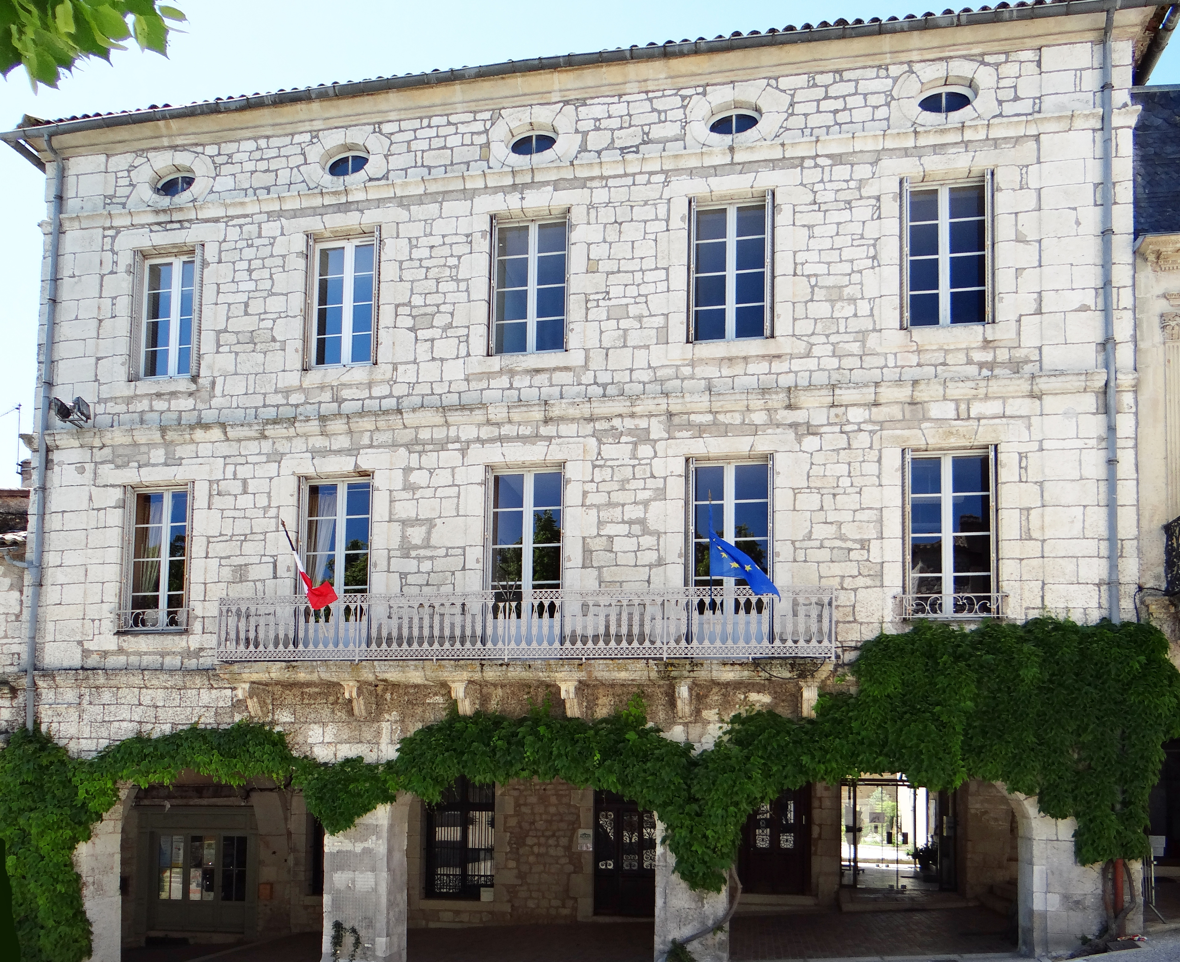 Monflanquin - Place des Arcades - La mairie